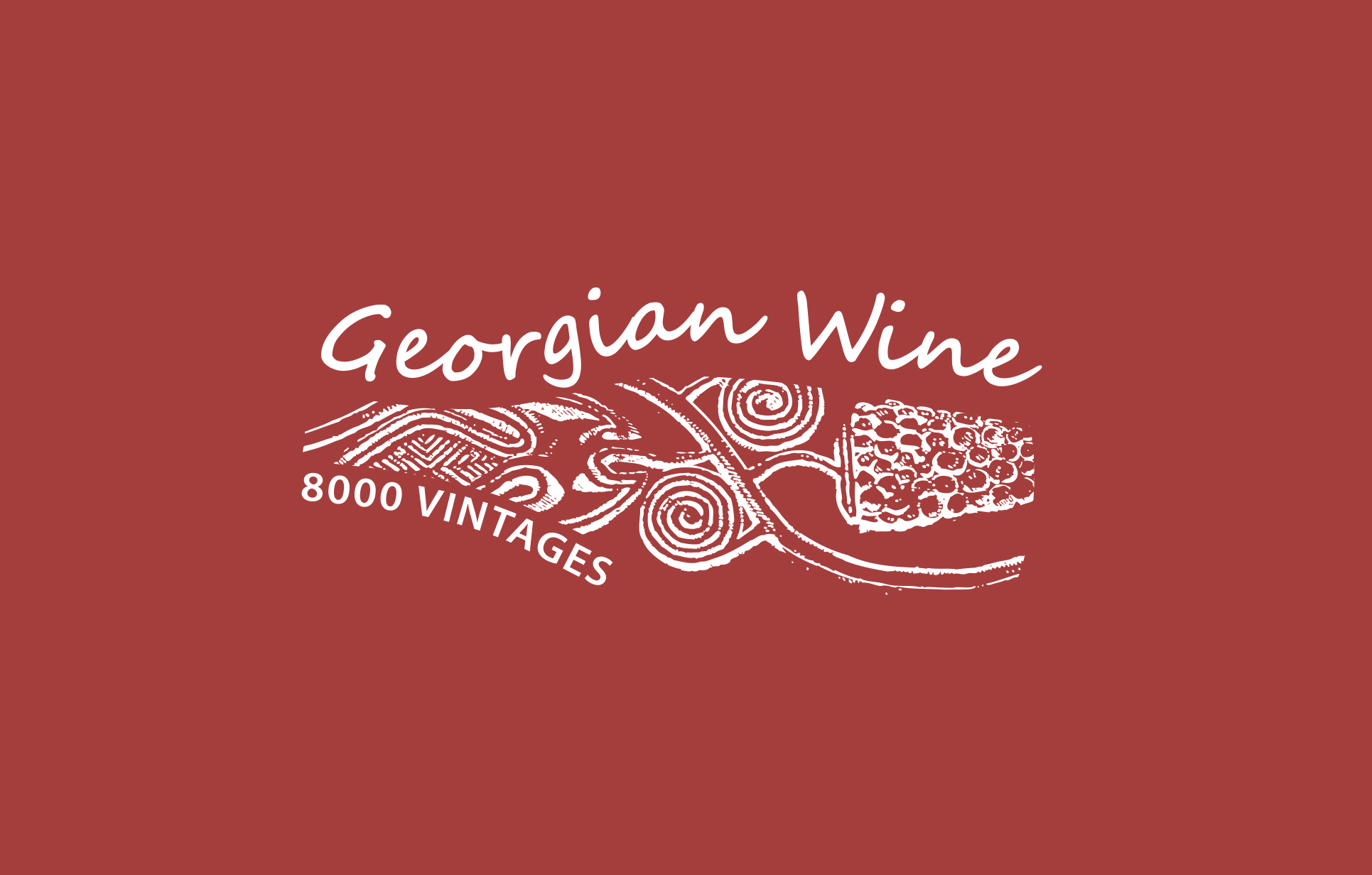 ღვინის ეროვნული სააგენტო